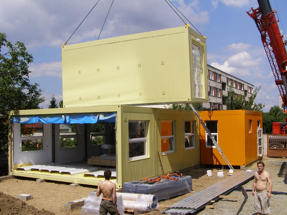 modularni_skolka